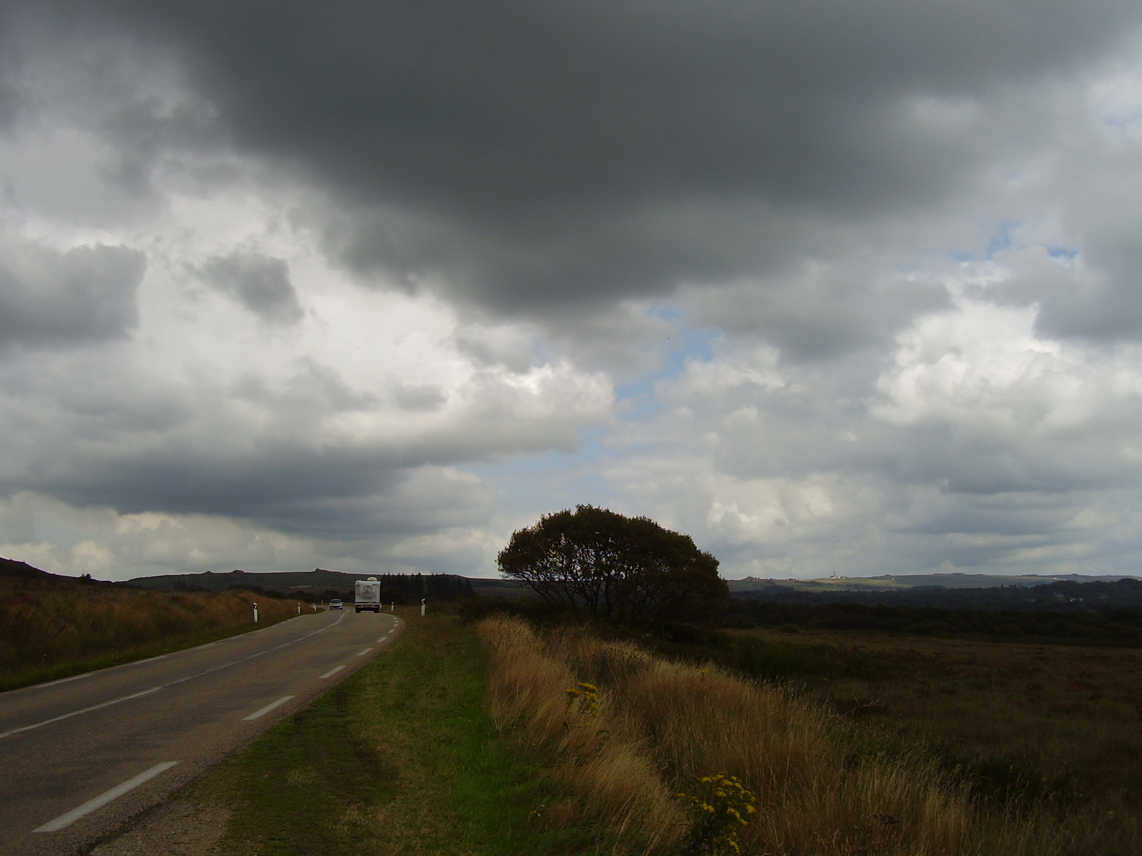 Plounéour-Ménez, Roc'h Trevezel, Bretagne; Frankreich